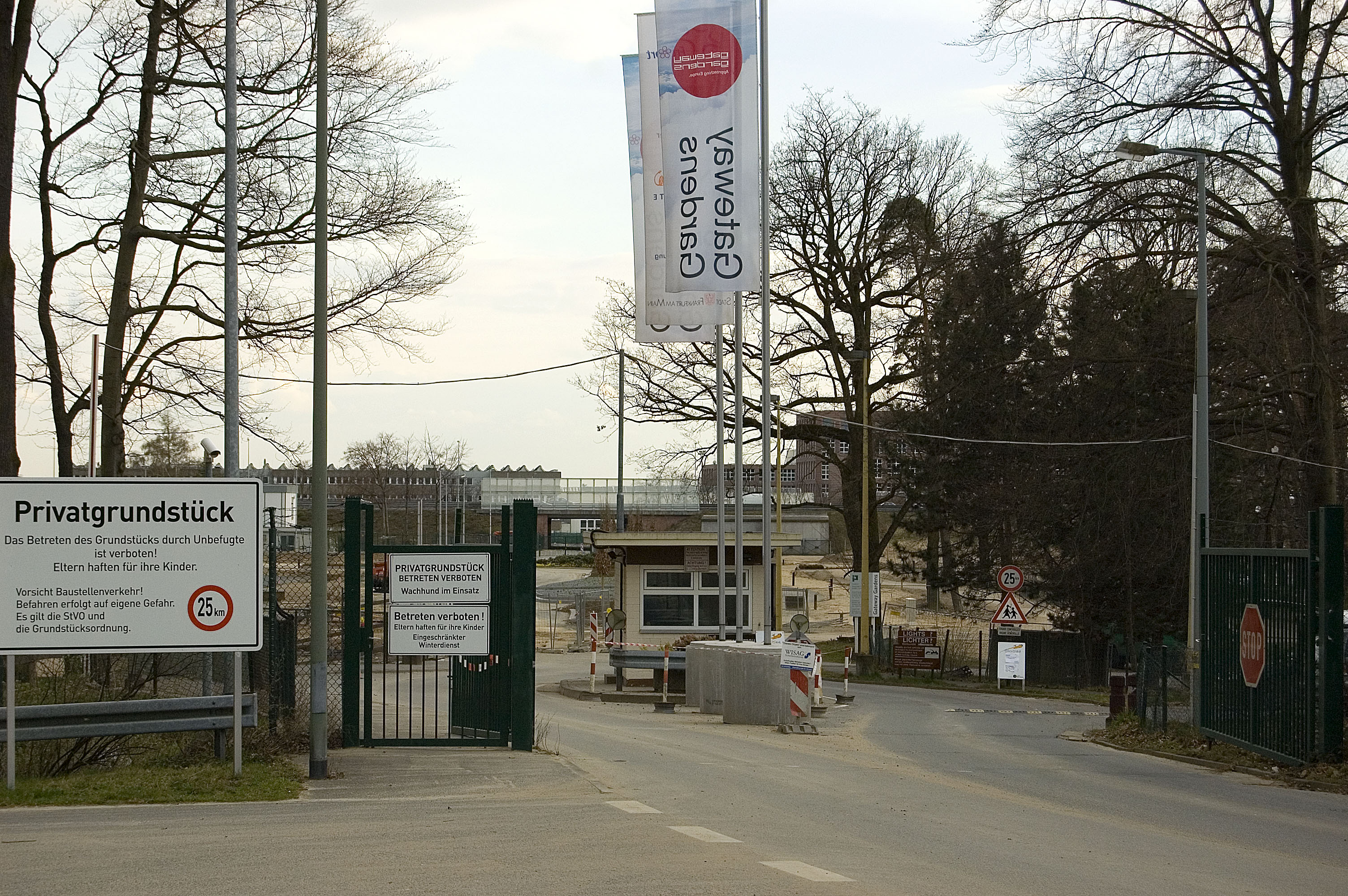 Einfahrt Gateway Gardens